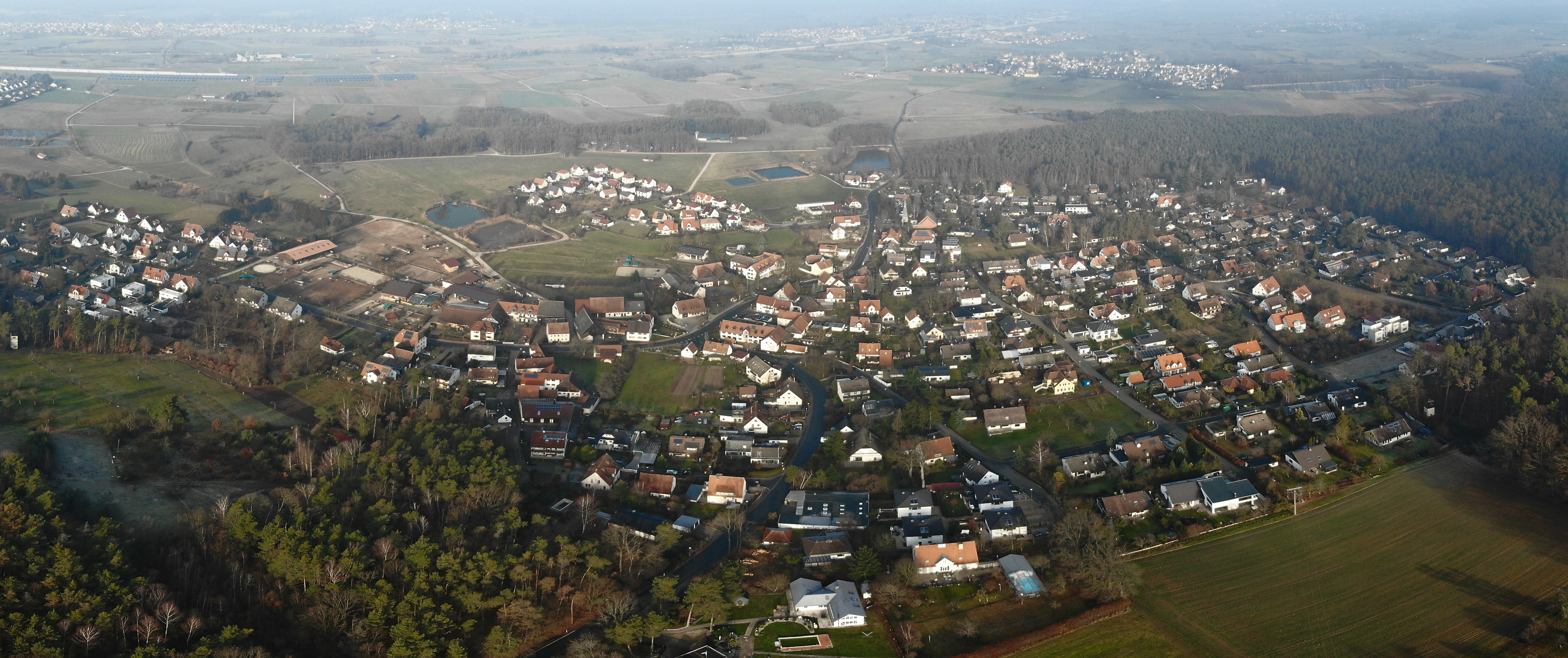 Bräuningshof Luftaufnahme